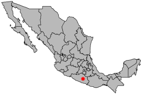 Locator map of Chilpancingo de los Bravo, Guerrero